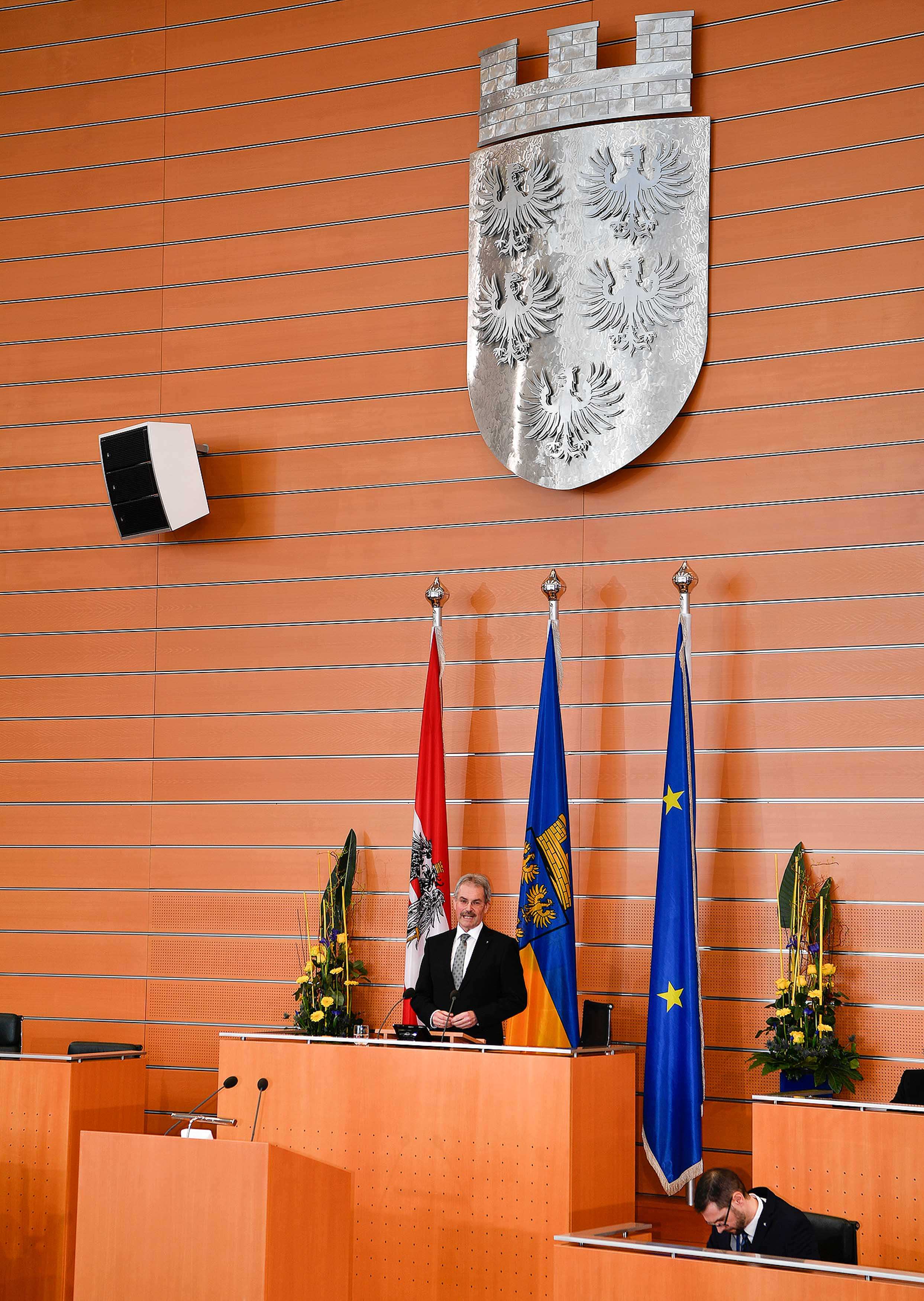 Am 22. März 2018 konstituierte sich der NÖ Landtag neu. Karl Wilfing wurde von den 56 Abgeordneten einstimmig als neuer Präsident des Landtages gewählt.